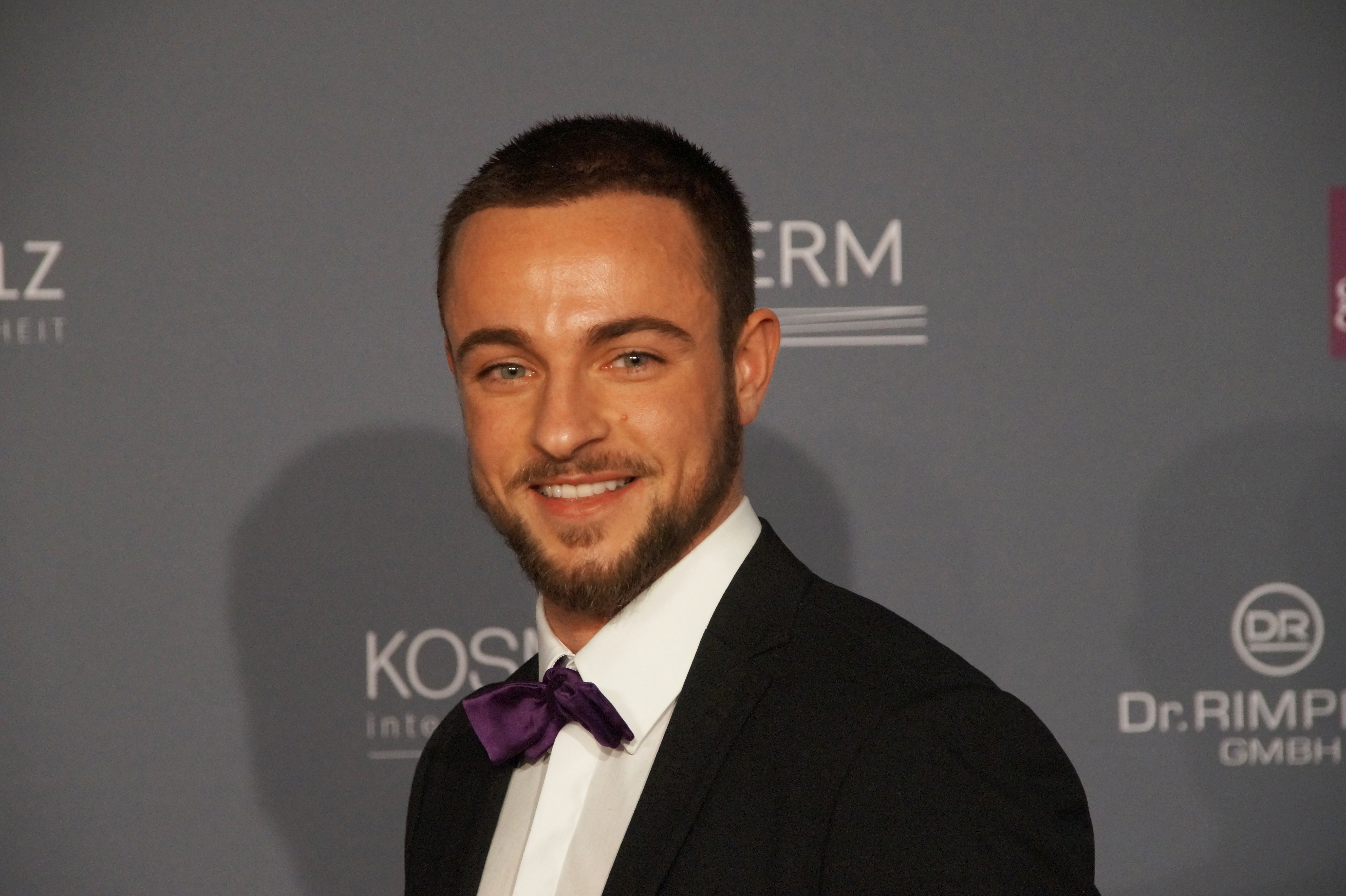 Benjamin Melzer beim "Gloria – Deutscher Kosmetikpreis" am 04. März 2016 im Hilton Hotel Düsseldorf.